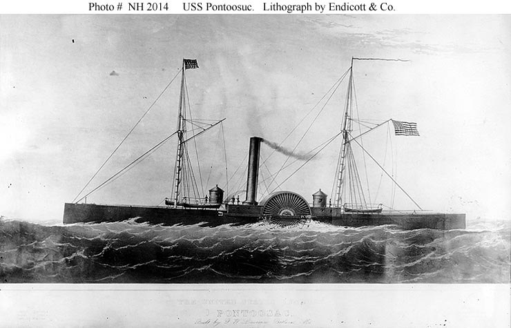 USS Pontoosuc